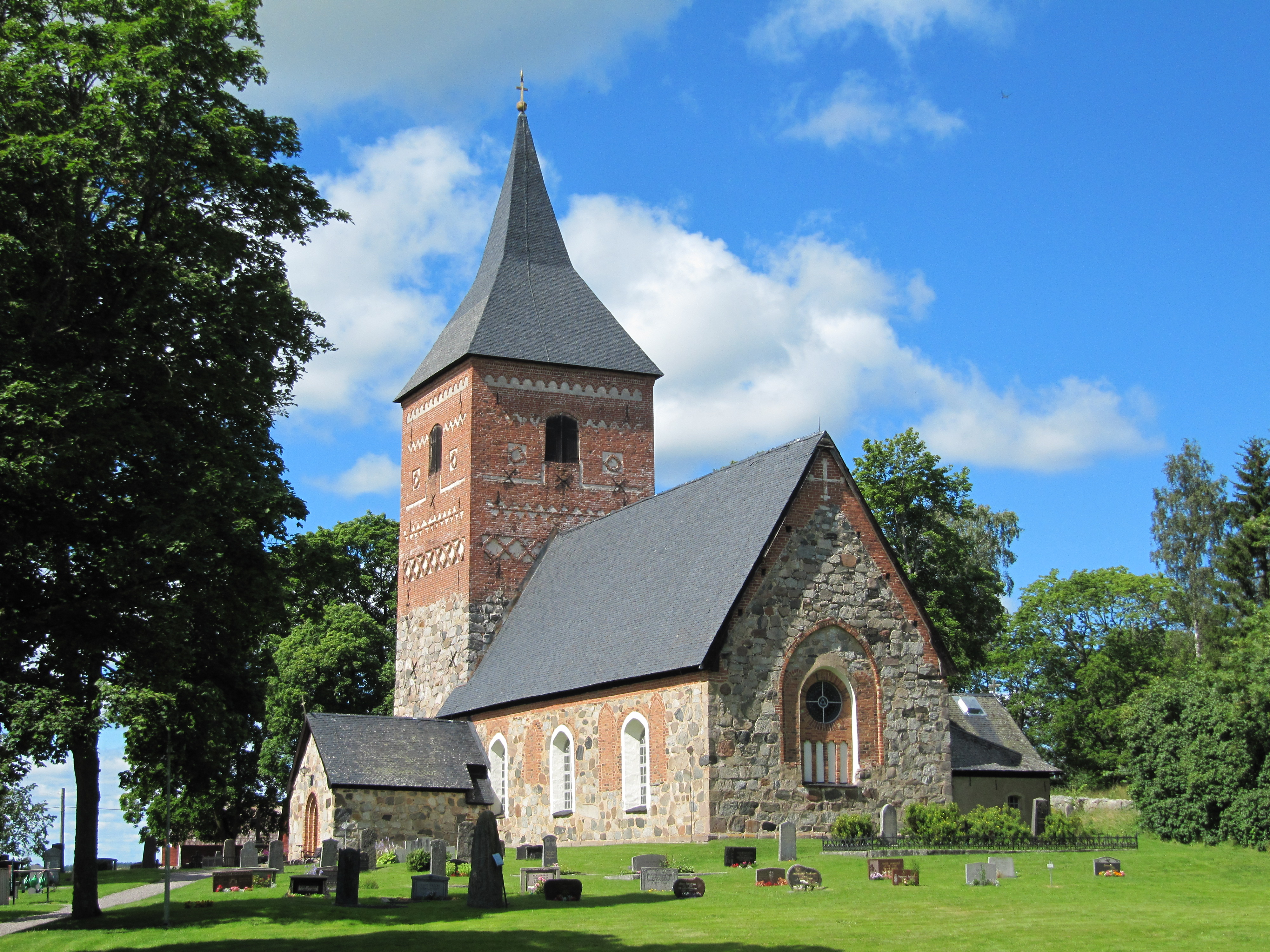 Skepptuna kyrka